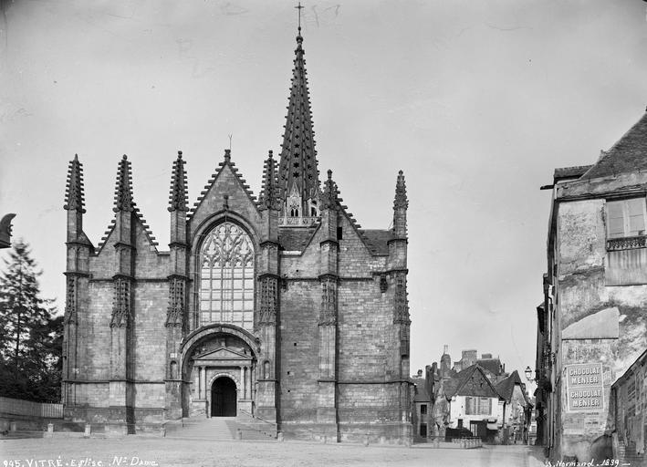 Façade Ouest de l'église Notre-Dame de Vitré.